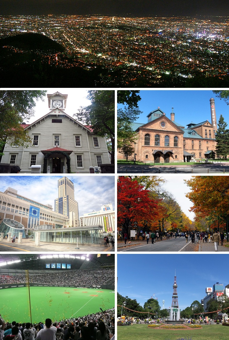 日本北海道札幌市的蒙太奇。